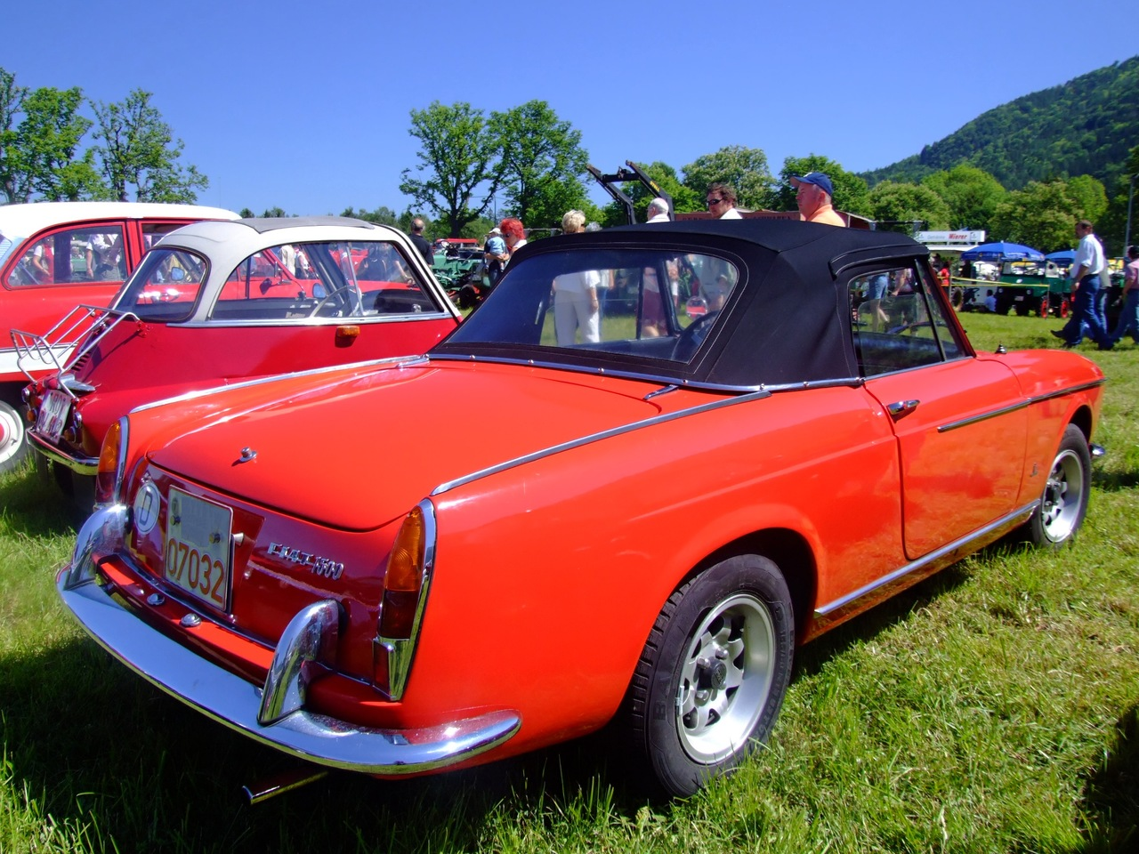 Quelle: selbst fotografiert, 05/2007 Fotograf: Späth Chr.